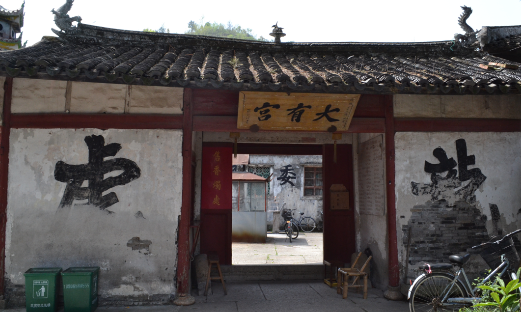 中文（中国大陆）: 委羽山大有宫山门